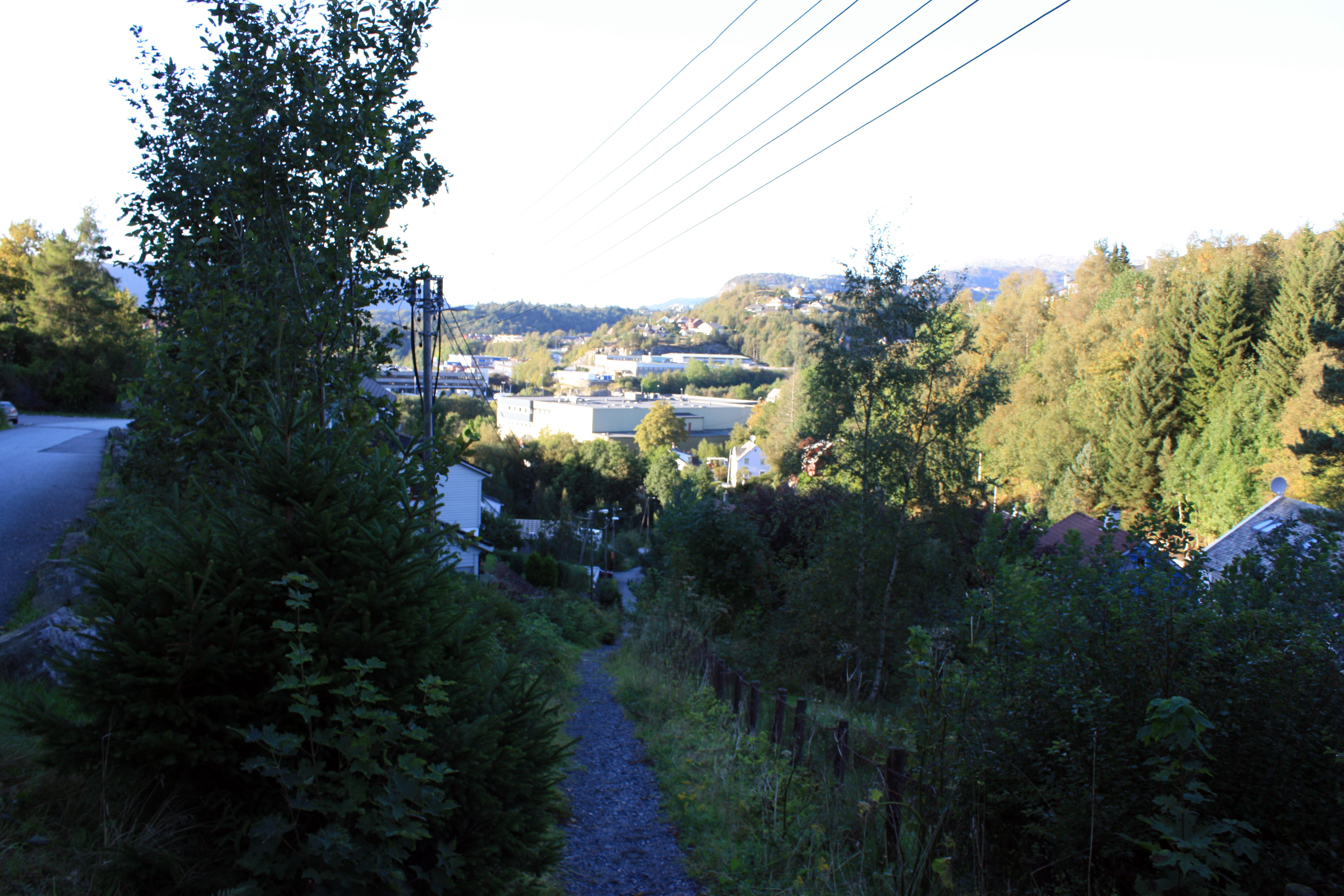 Ulsmågskaret, Fana, Bergen.